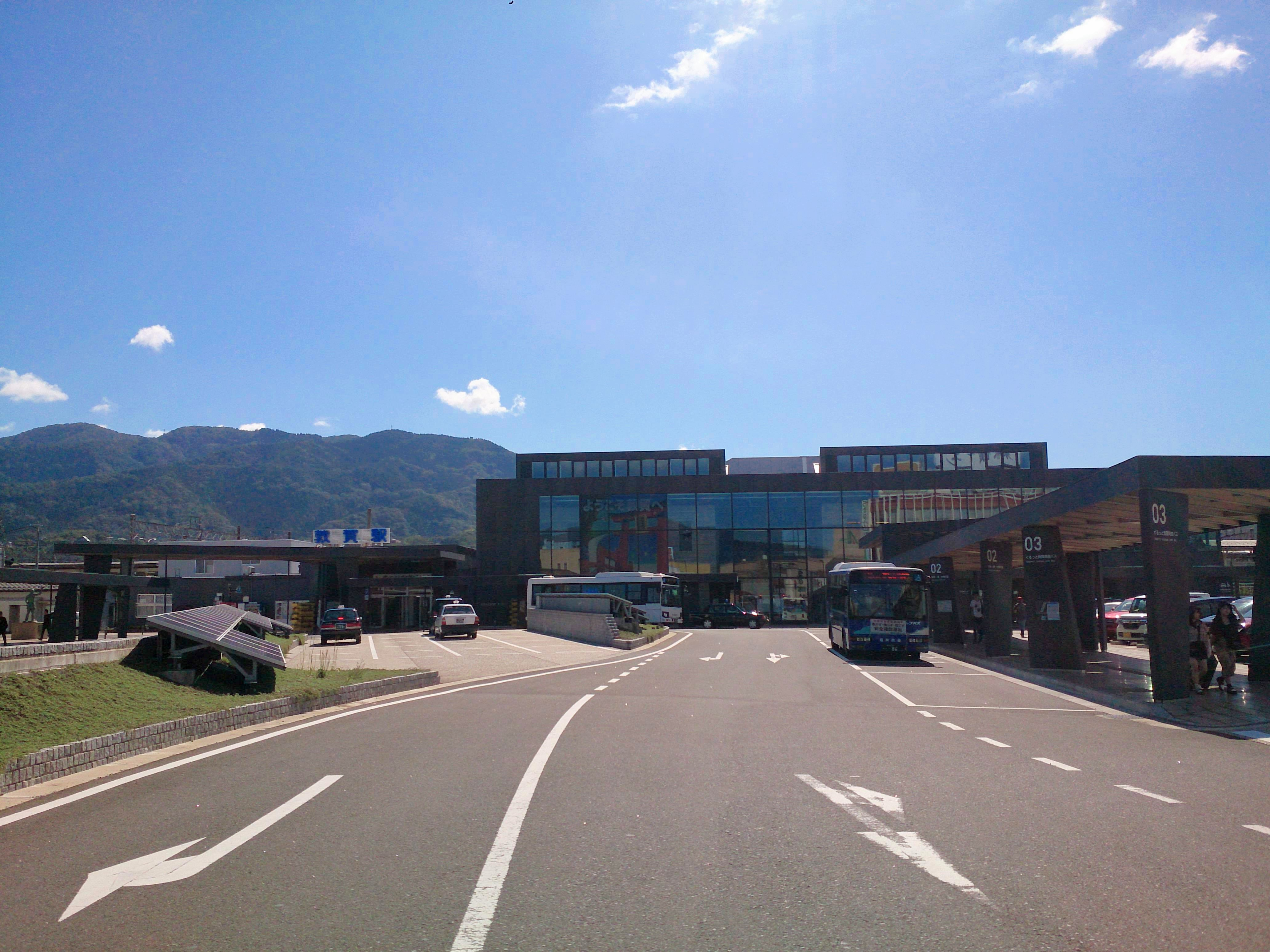 敦賀駅の駅舎